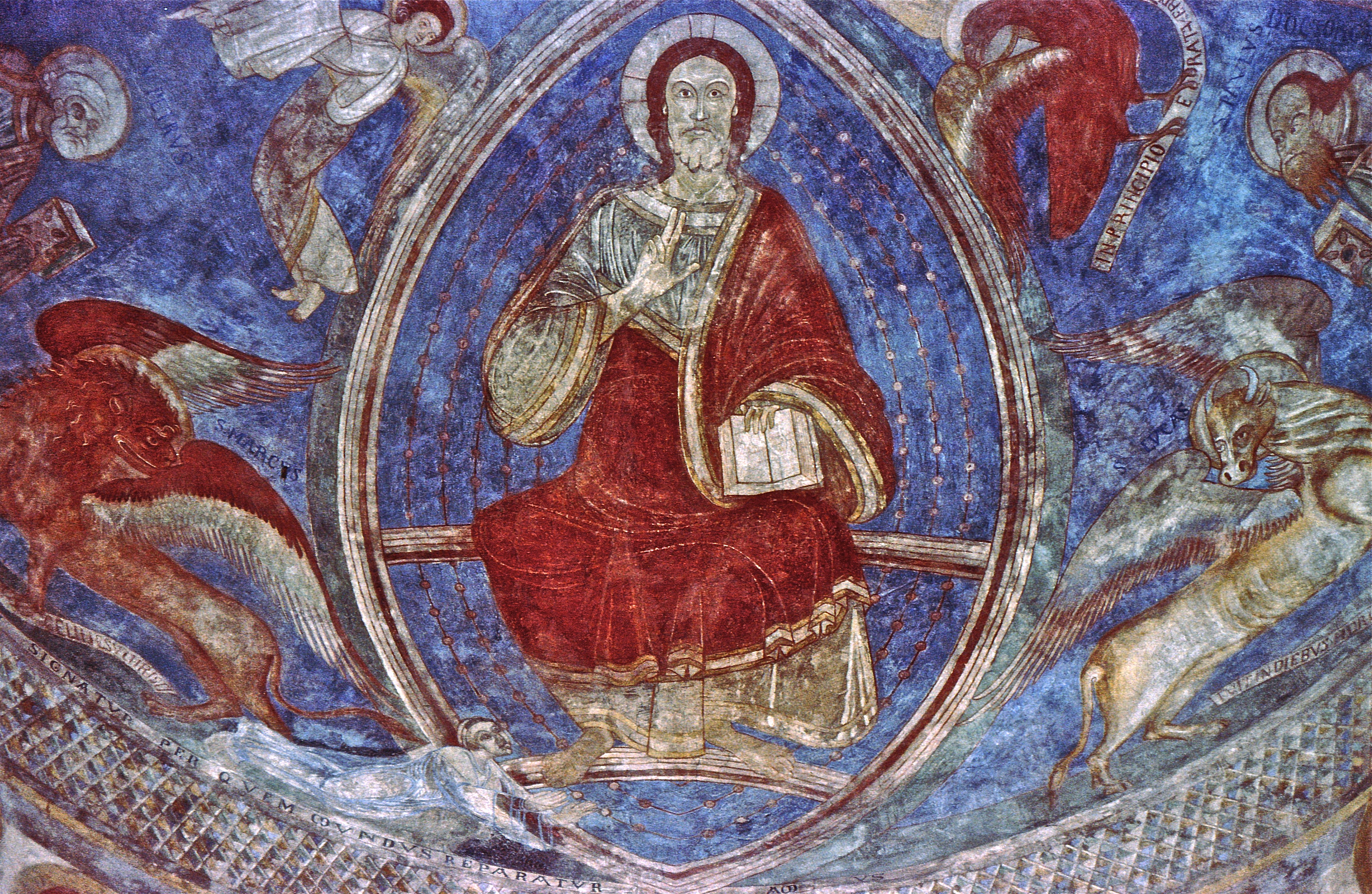 Fresko in der Westapsis der Basilika von Kloster Knechtsteden - Darstellung von Christus als Weltherrscher (Pantokrator) in der Mandorla, ca. 1160